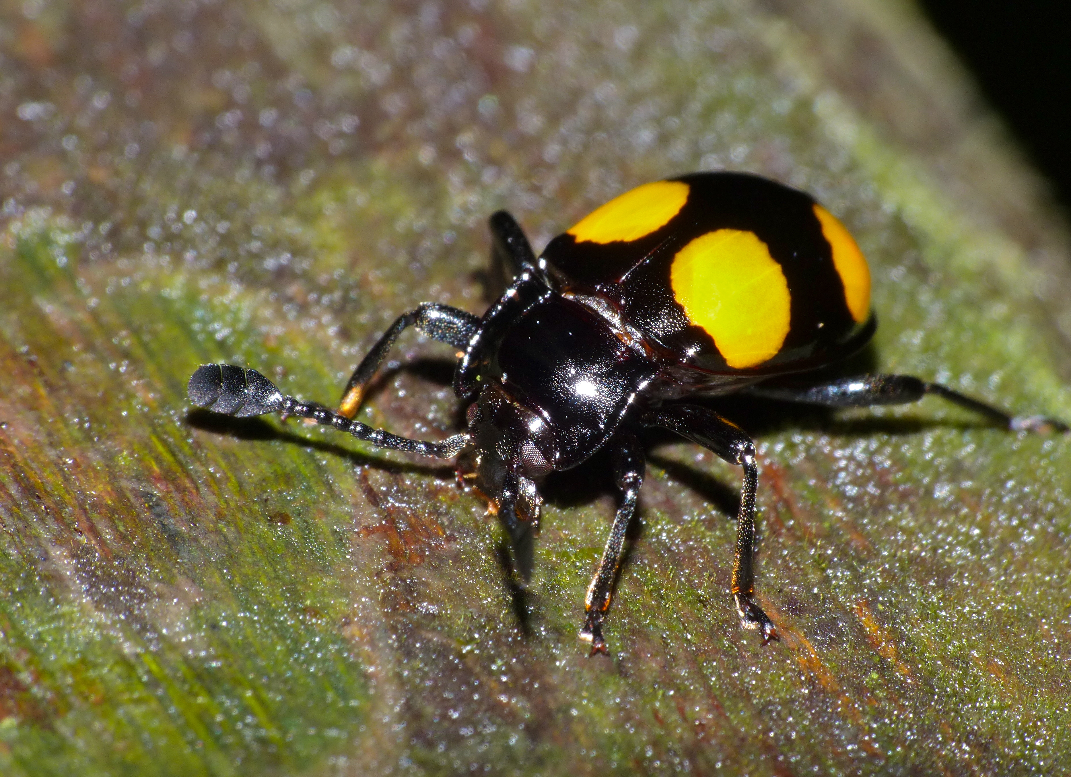 Deer Cave Boardwalk, Mulu NP, Sarawak, MALAYSIA